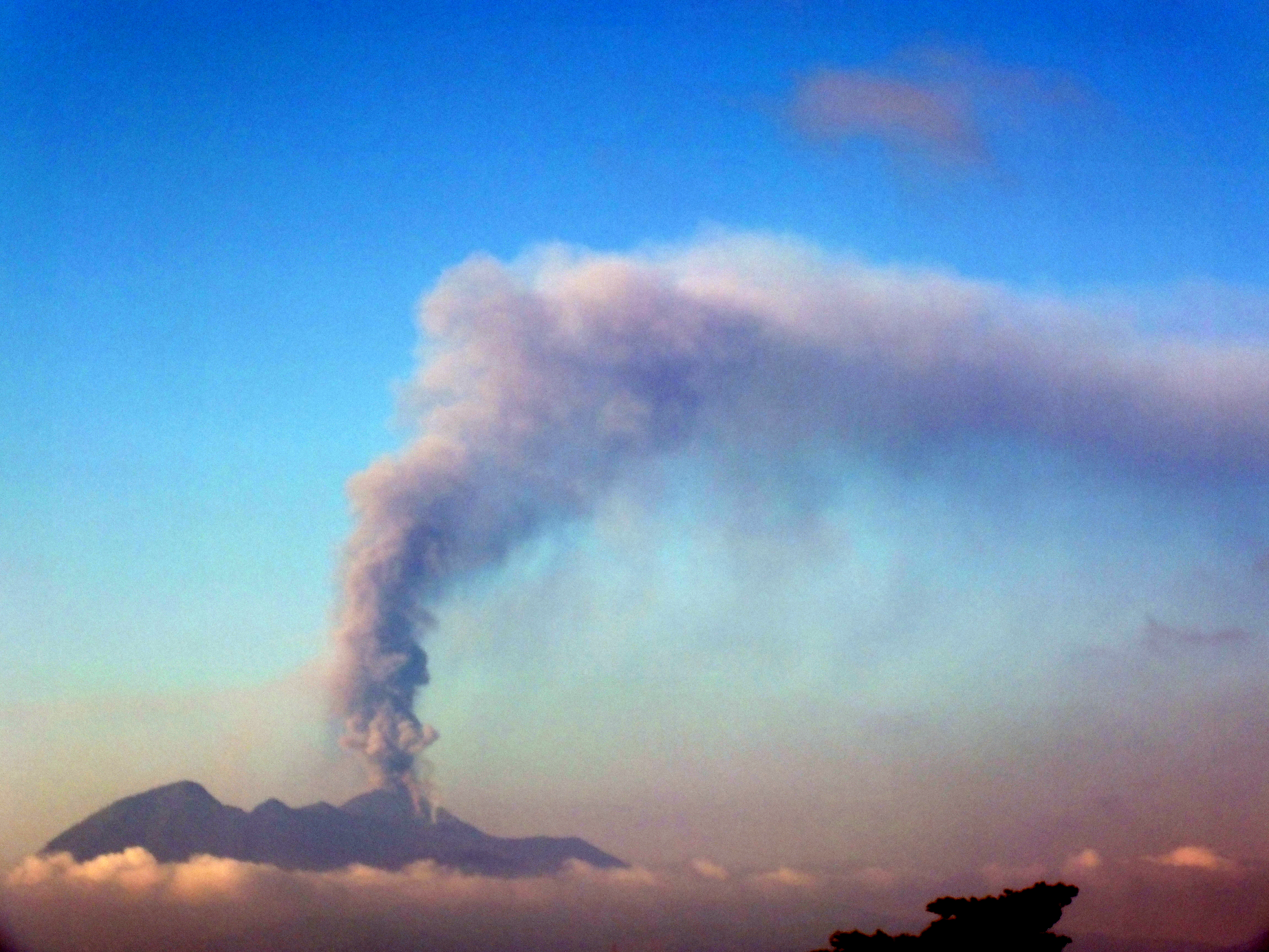 Volcan Pacaya